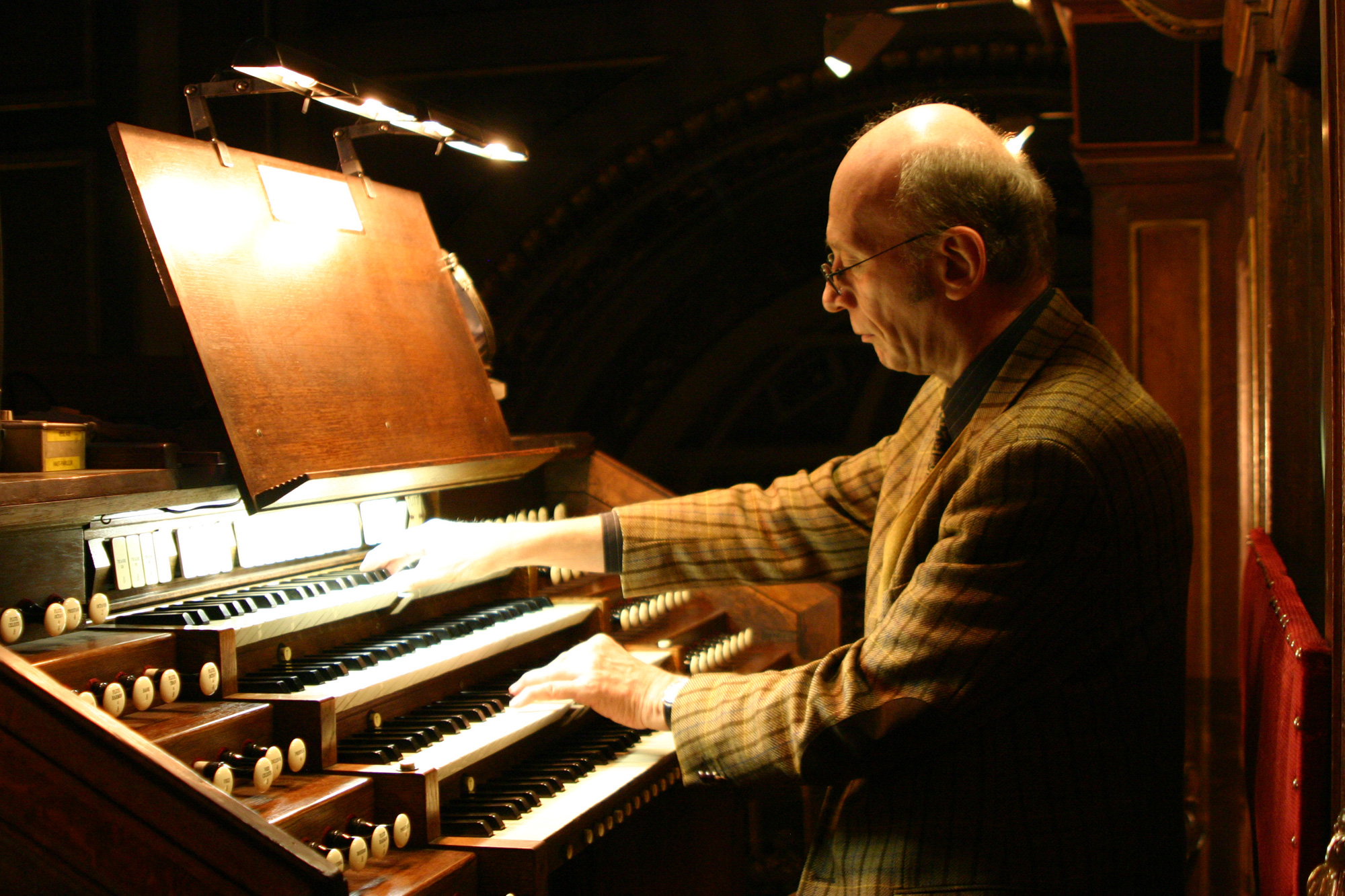 François-Henri Houbart, organiste titulaire des grandes orgues historiques de La Madeleine à Paris